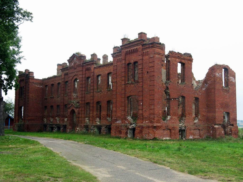 Беларуская (тарашкевіца): Дзісна